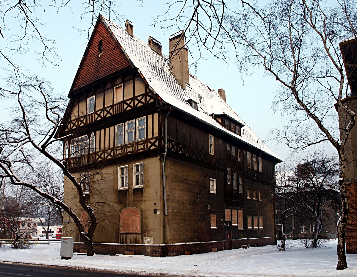 Ulica Stalmacha w Zabrzu. Budynek nr 15-15a.